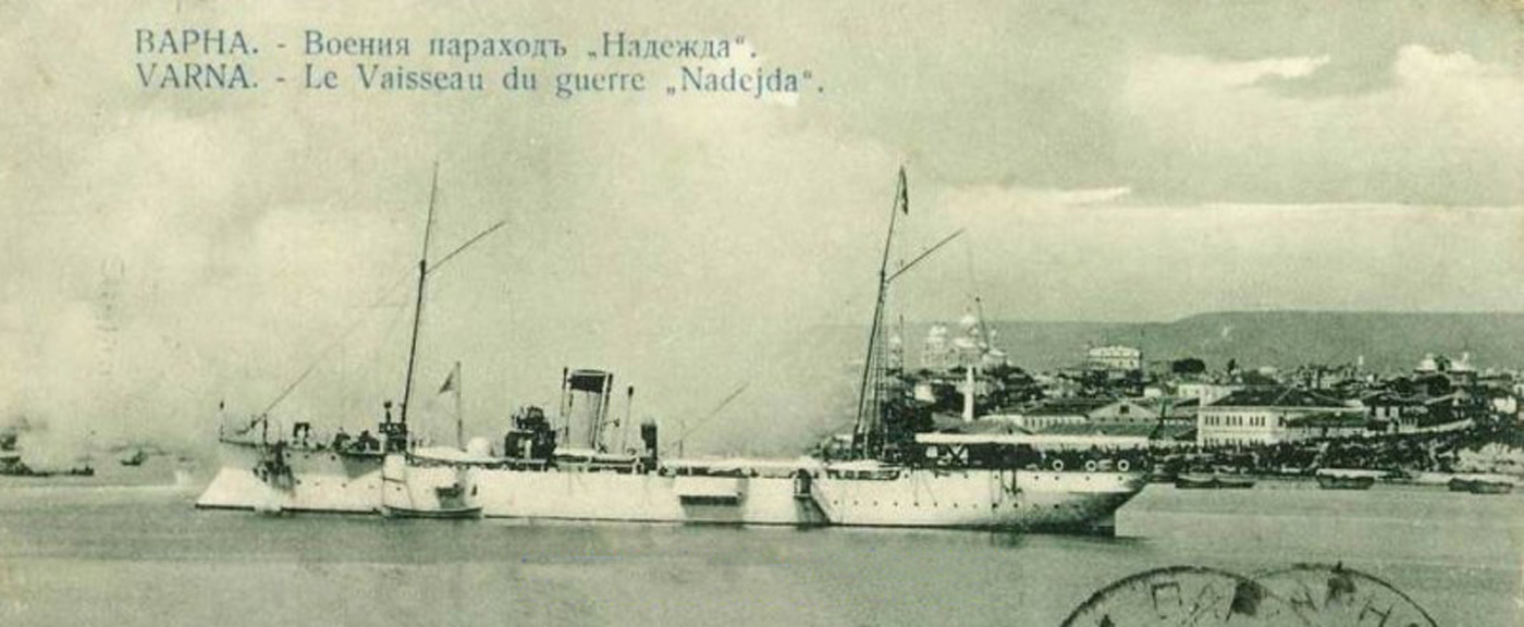 Крейсер „Надежда“ в Варне. Болгарская открытка 1910-х гг.